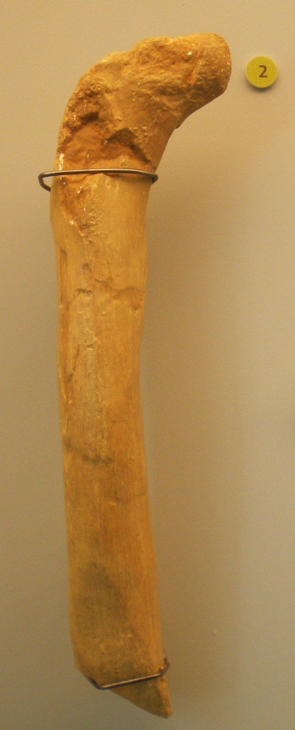 Fossil of Betasuchus, a theropod dinosaur Took the photo at Musee d'Histoire Naturelle, Brussels